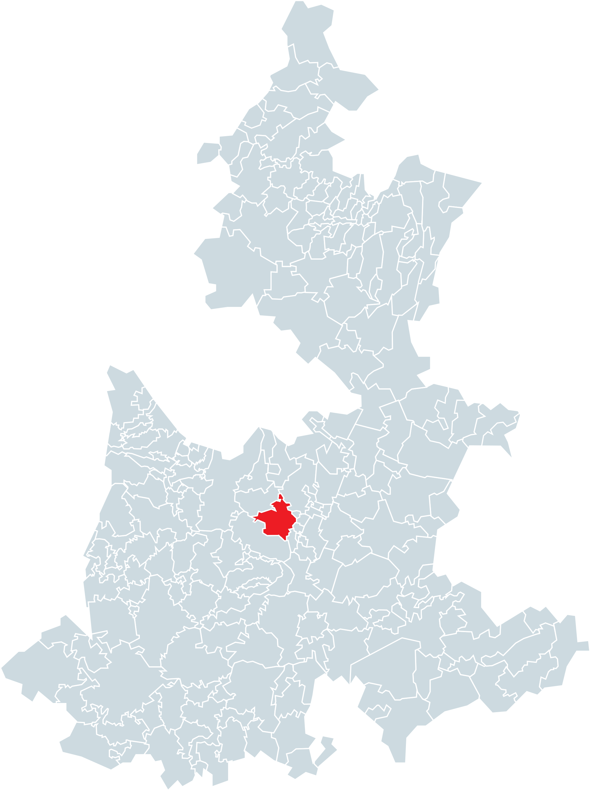 Municipio de Tecali de Herrera